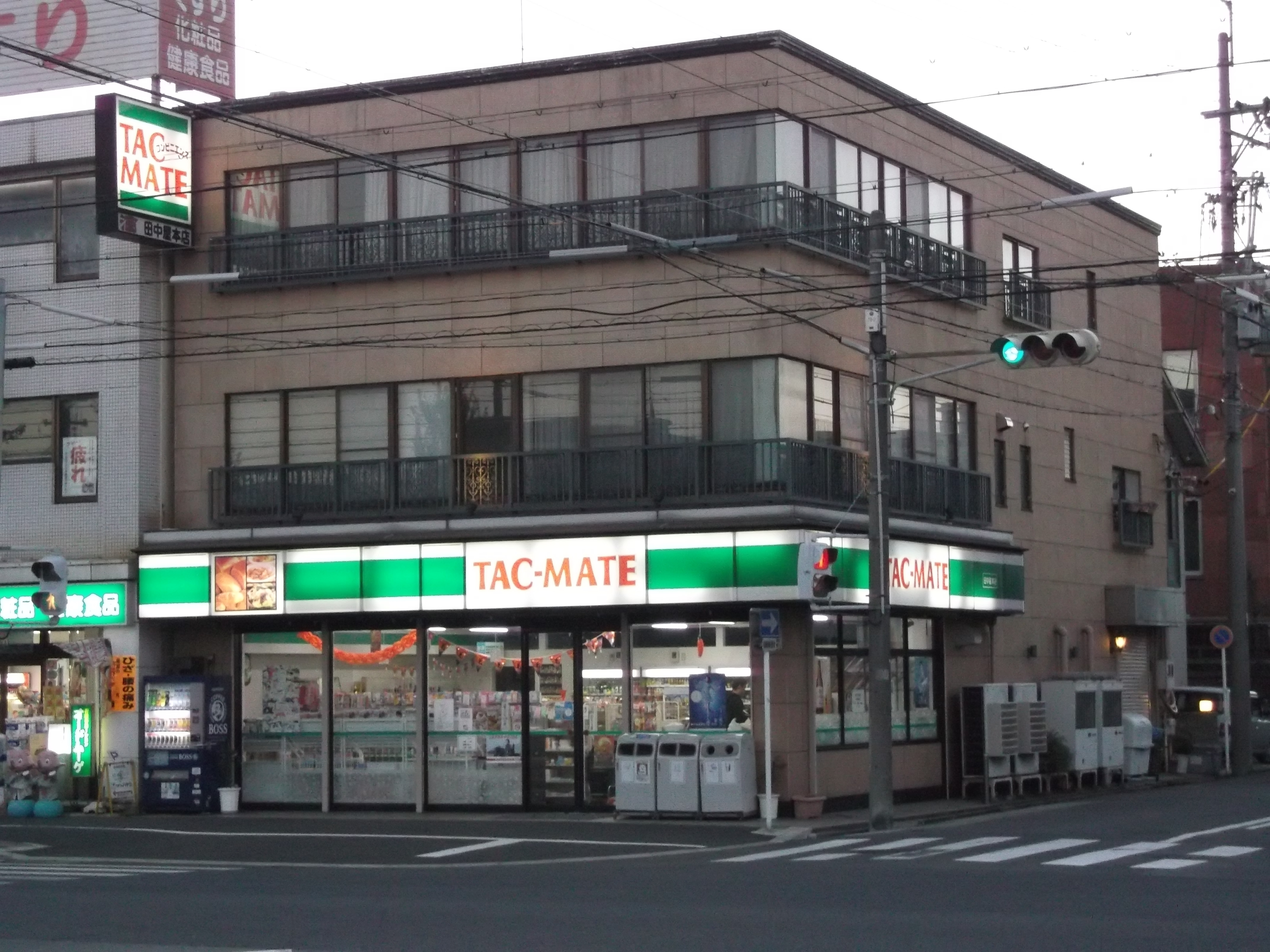 名古屋市中川区愛知町のコンビニTAC-MATE田中屋本店を東側公道北側より撮影